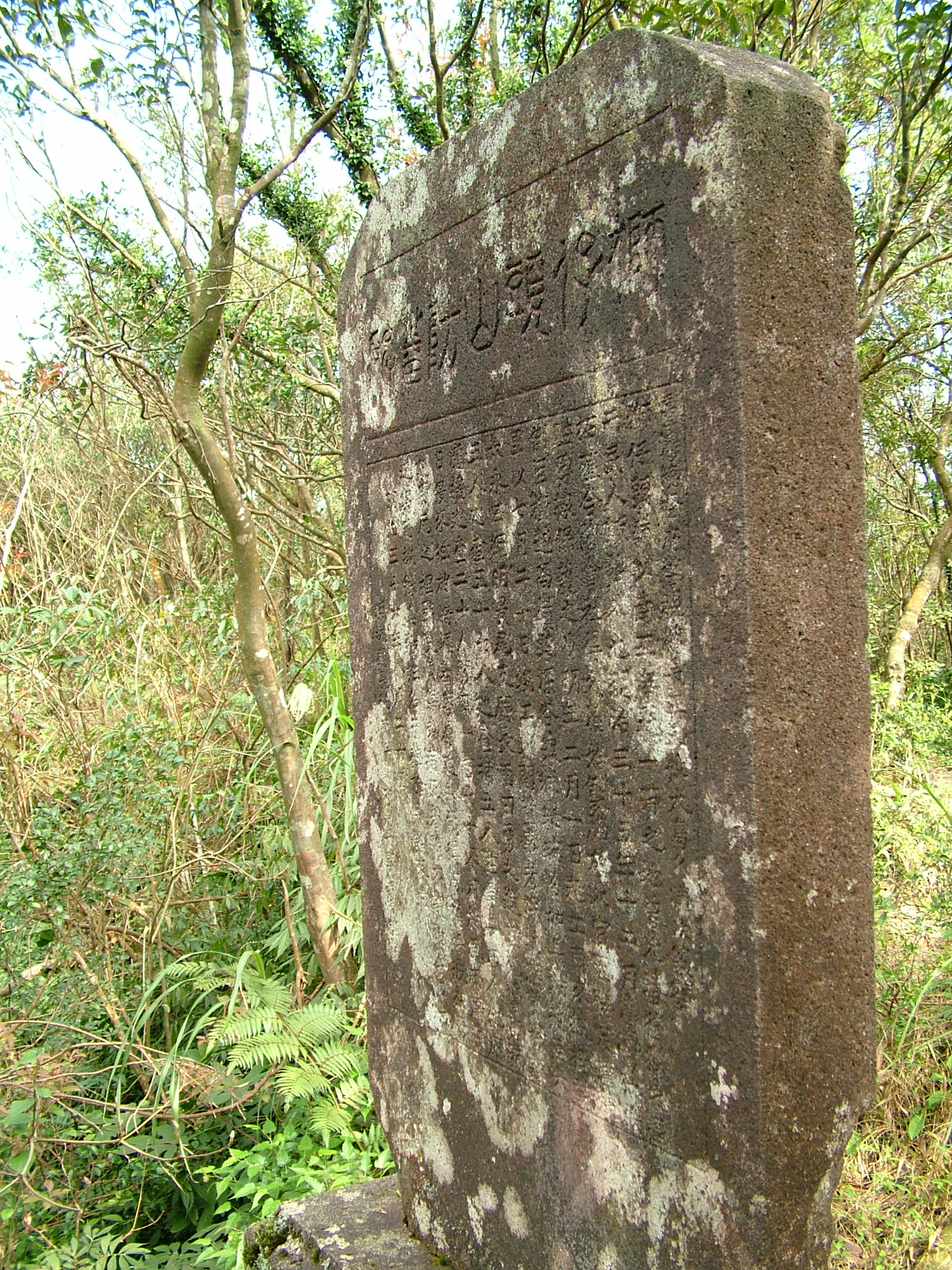 『獅仔頭山防蕃碑』臺灣總督府警視廳長「大島久滿次」撰寫，內文為深坑廳長「丹野英清」所書 ShiZaiTou Shan FangFan Inscription 2006